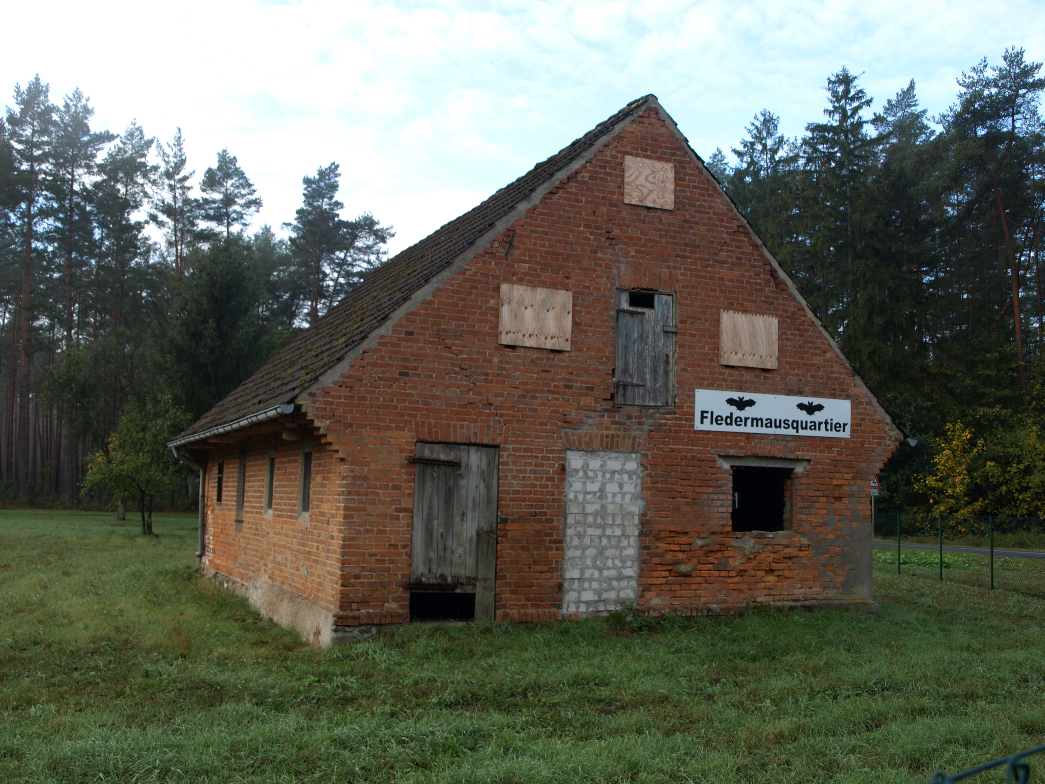 Fledermausquartier in Deutschland